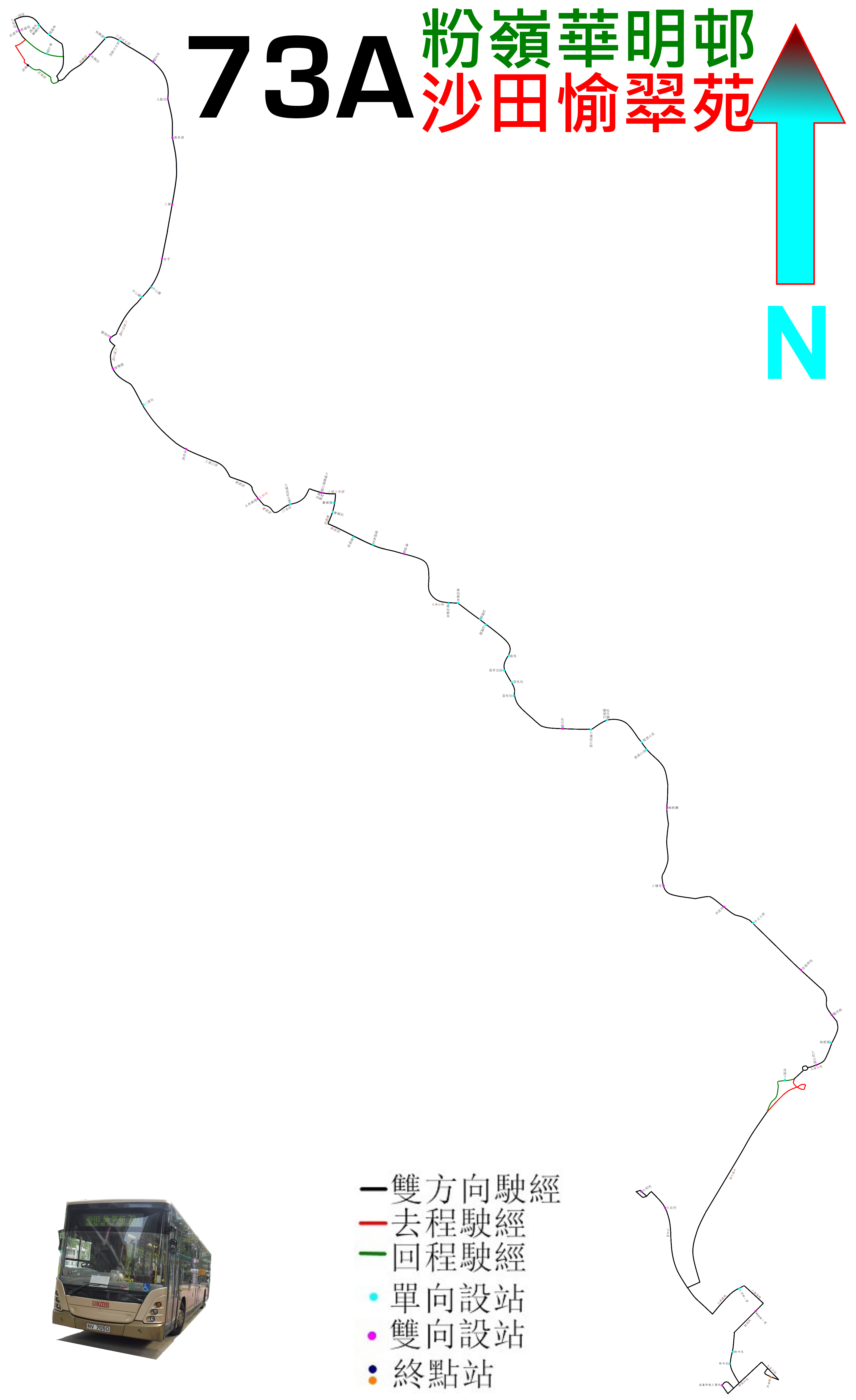 中文（香港）: 九巴73A線的走線圖